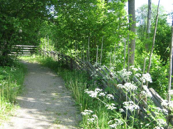 wikparken